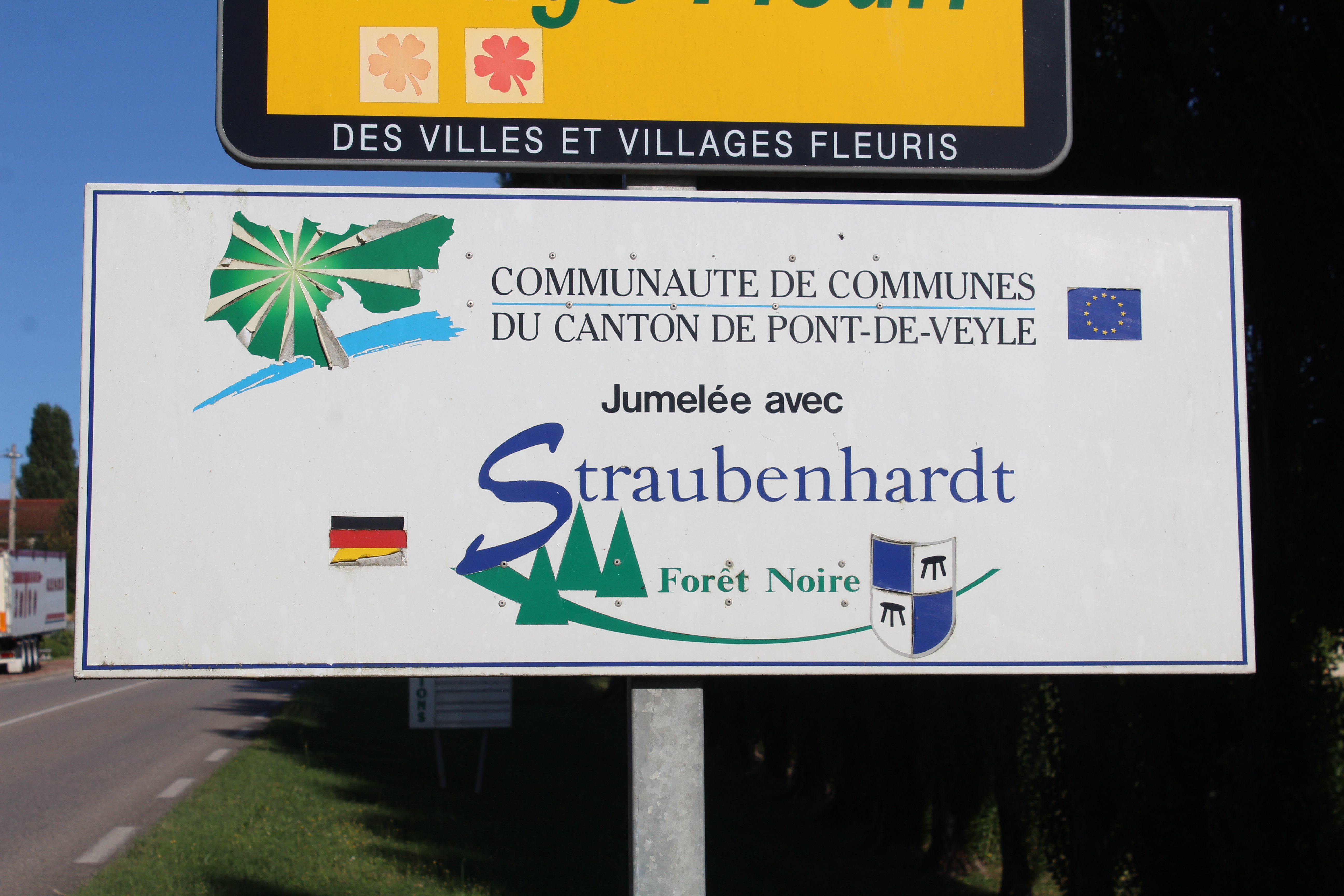 Le panneau indiquant le jumelage entre le canton de Pont-de-Veyle et Straubenhardt à Saint-Cyr-sur-Menthon.